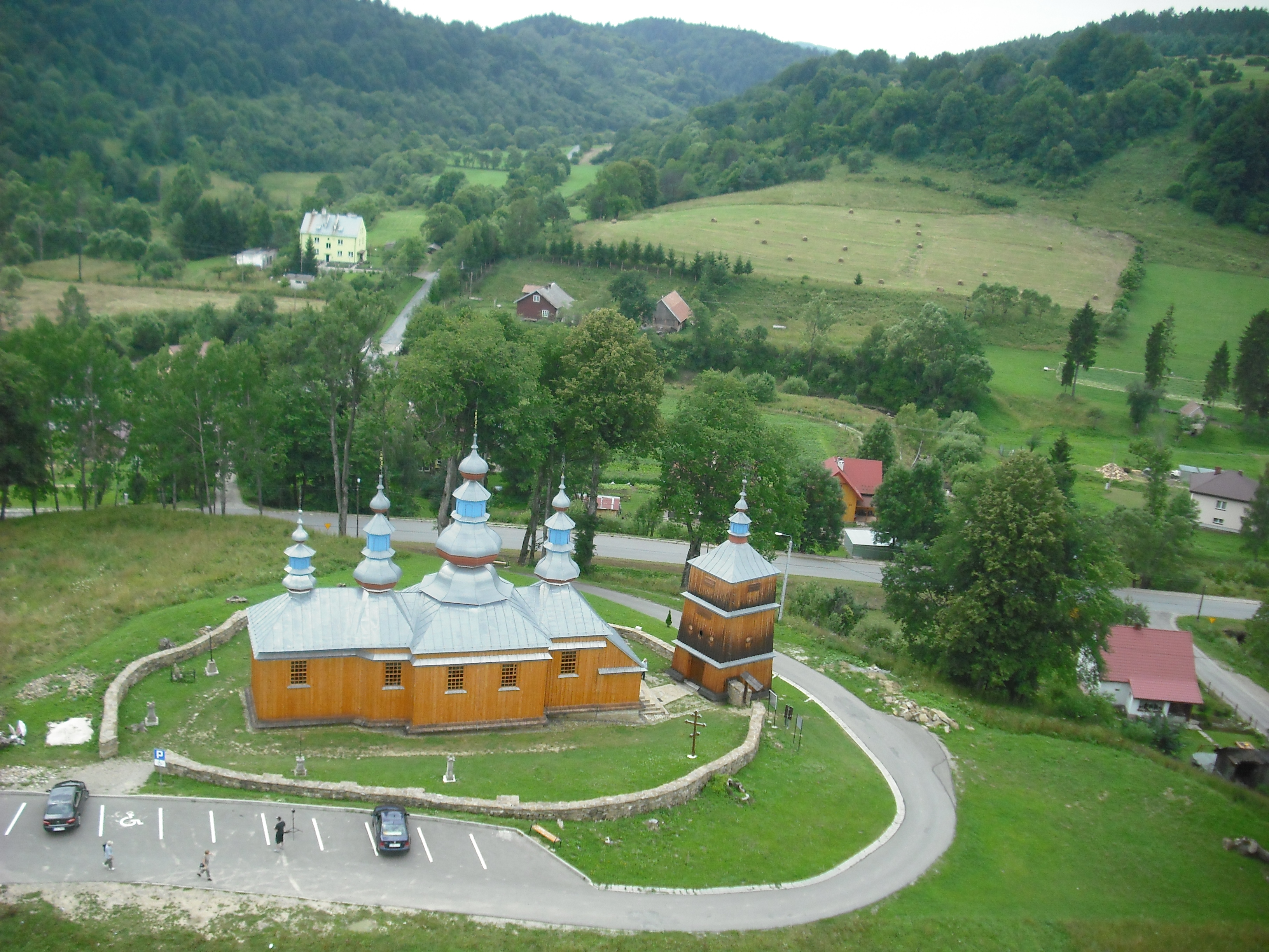 zespół cerkwi gr.-kat. p.w. NMP, ob. prawosławna cerkiew gr.-kat. p.w. NMP, ob. prawosławna dzwonnica przy cerkwi gr.-kat. p.w. NMP, ob. prawosławnej ogrodzenie przy cerkwi gr.-kat. p.w. NMP, ob. prawosławnej Widok z lotu ptaka Komańcza (zabytek nr A-171 z 05.01.1971)